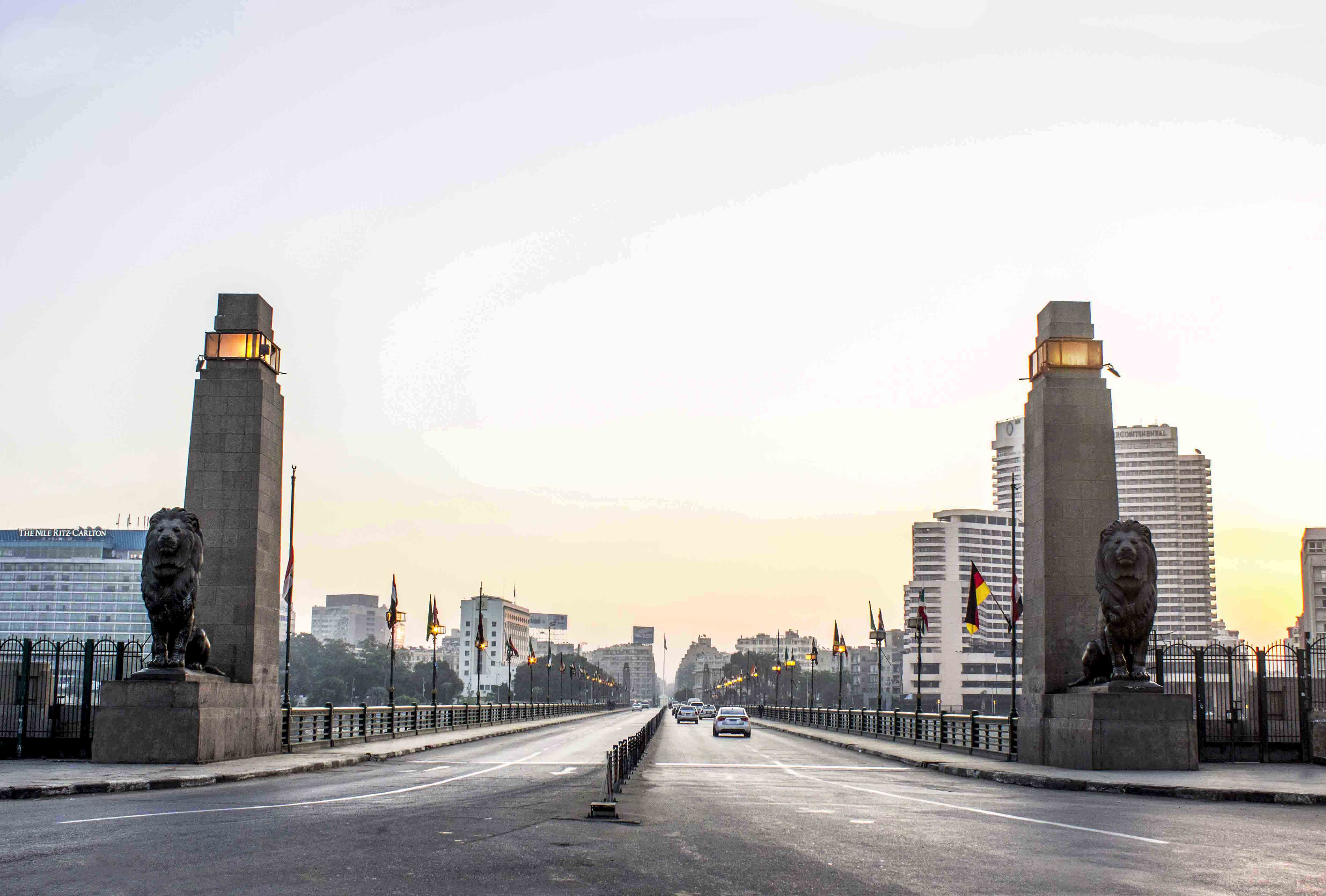 مصرى: كوبري قصر النيل في لحظات الشروق _ القاهرة This is a photo of a monument in Egypt identified by the ID كوبري قصر النيل كوبري يقع بالقرب من ميدان التحرير بالقاهرة, يعد أول كوبري أنشأ في مصر للعبور على النيل، ويتميز بتلك التماثيل الأربعة للأسود القابعة عند مدخلي الكوبري المصنوعة من البرونز.